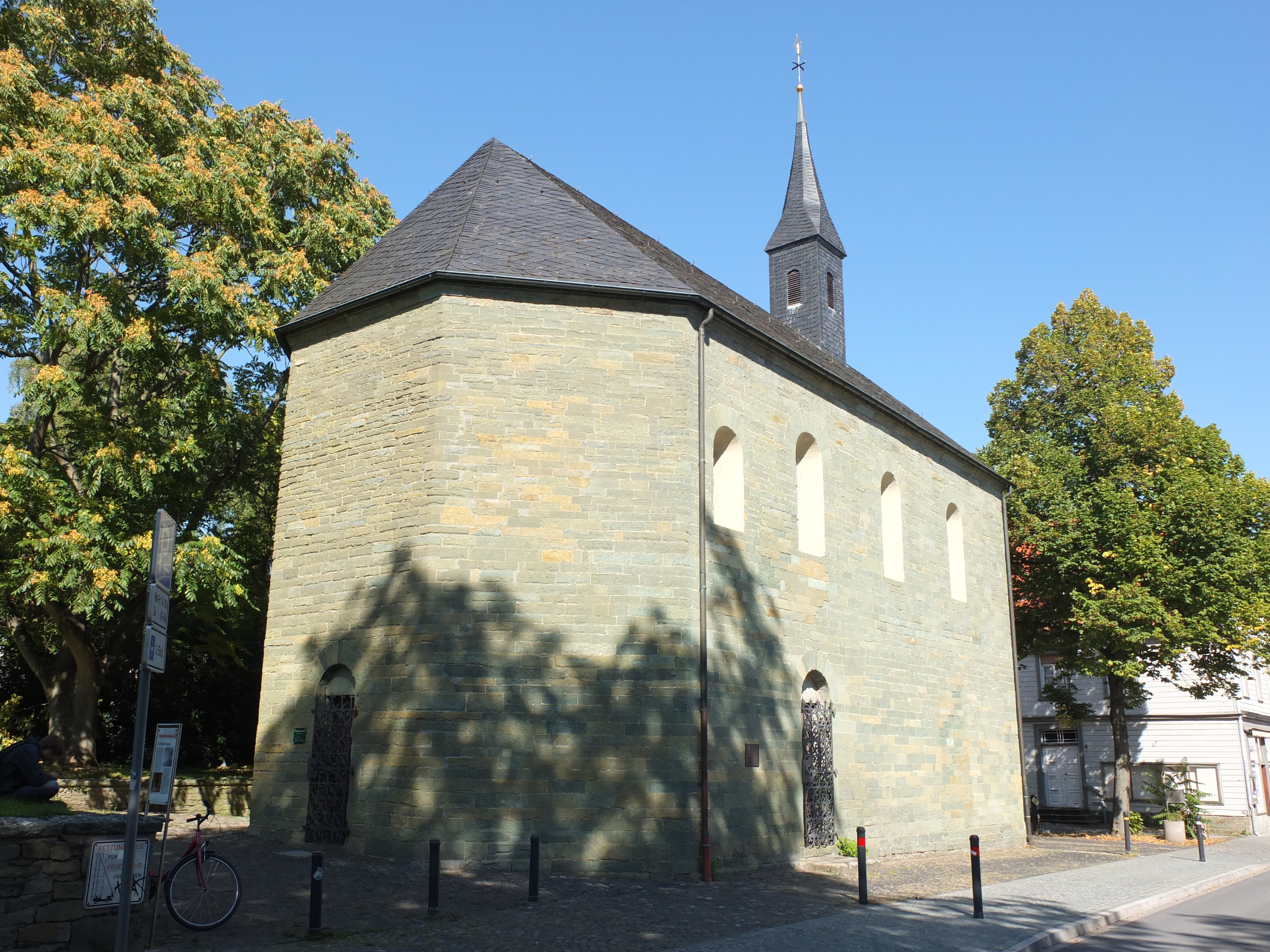 Nikolaikapelle in SoestThis is a photograph of an architectural monument.It is on the list of cultural monuments of Soest